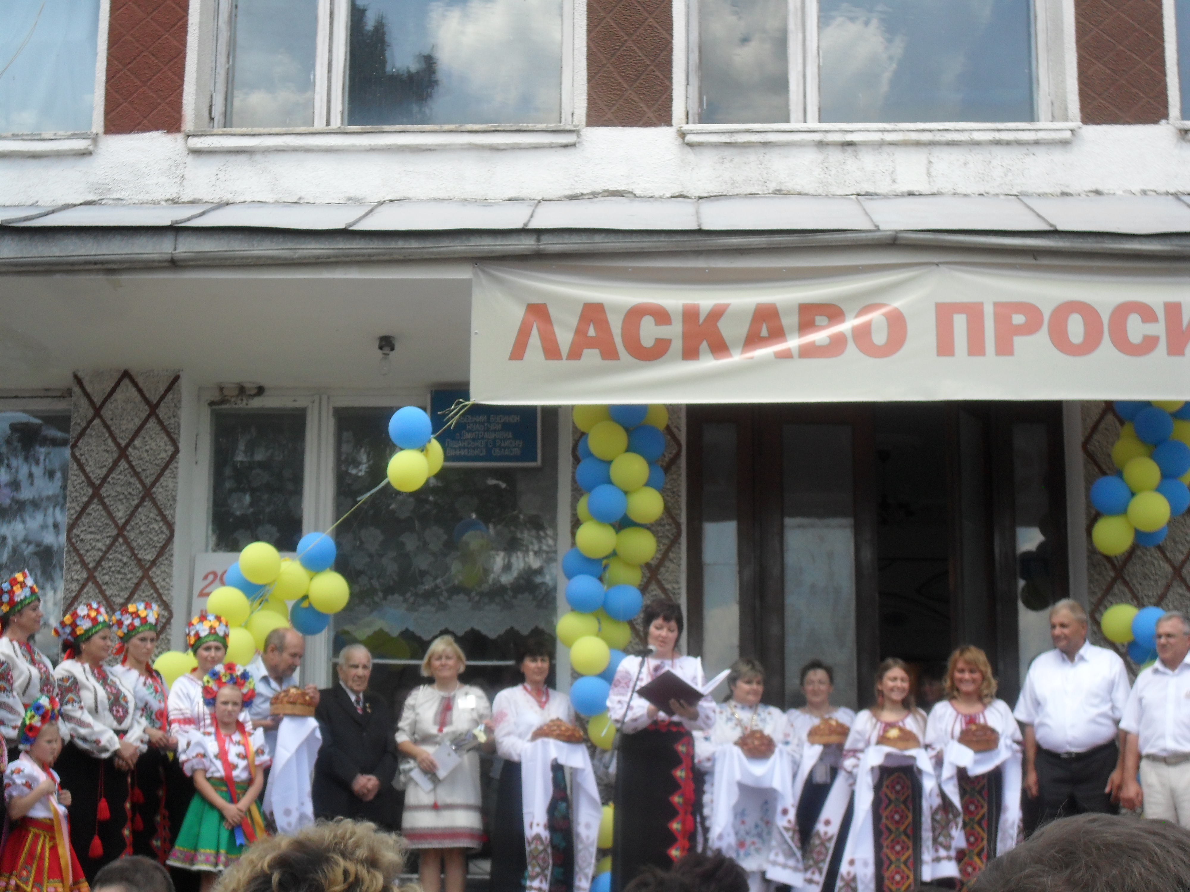 Третій міжнародний фестиваль імені Павла Муравського. Під час церемонії відкриття